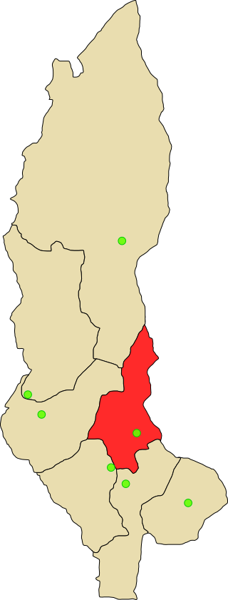 Provincia de Bongará en departamento Amazonas